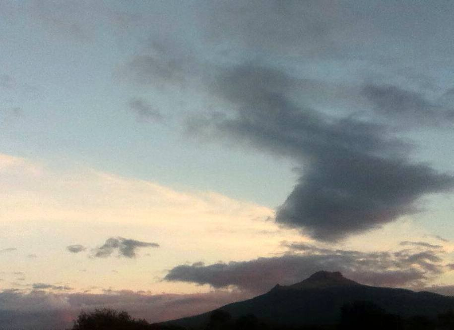 Volcán Malinche visto desde Chiautempan